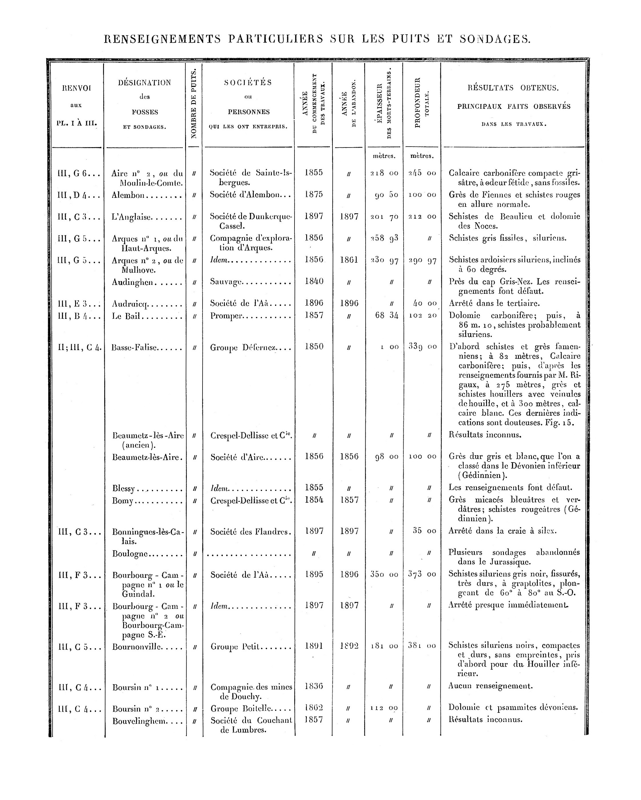 Liste des puits de mine et des sondages. Mines du Boulonnais. Document extrait de Étude des Gîtes Minéraux de la France. Topographie Souterraine du Bassin Houiller du Boulonnais ou Bassin d'Hardinghen, par A. Olry, ingénieur en chef des Mines. Chapitre IX, pages 172 à 189.